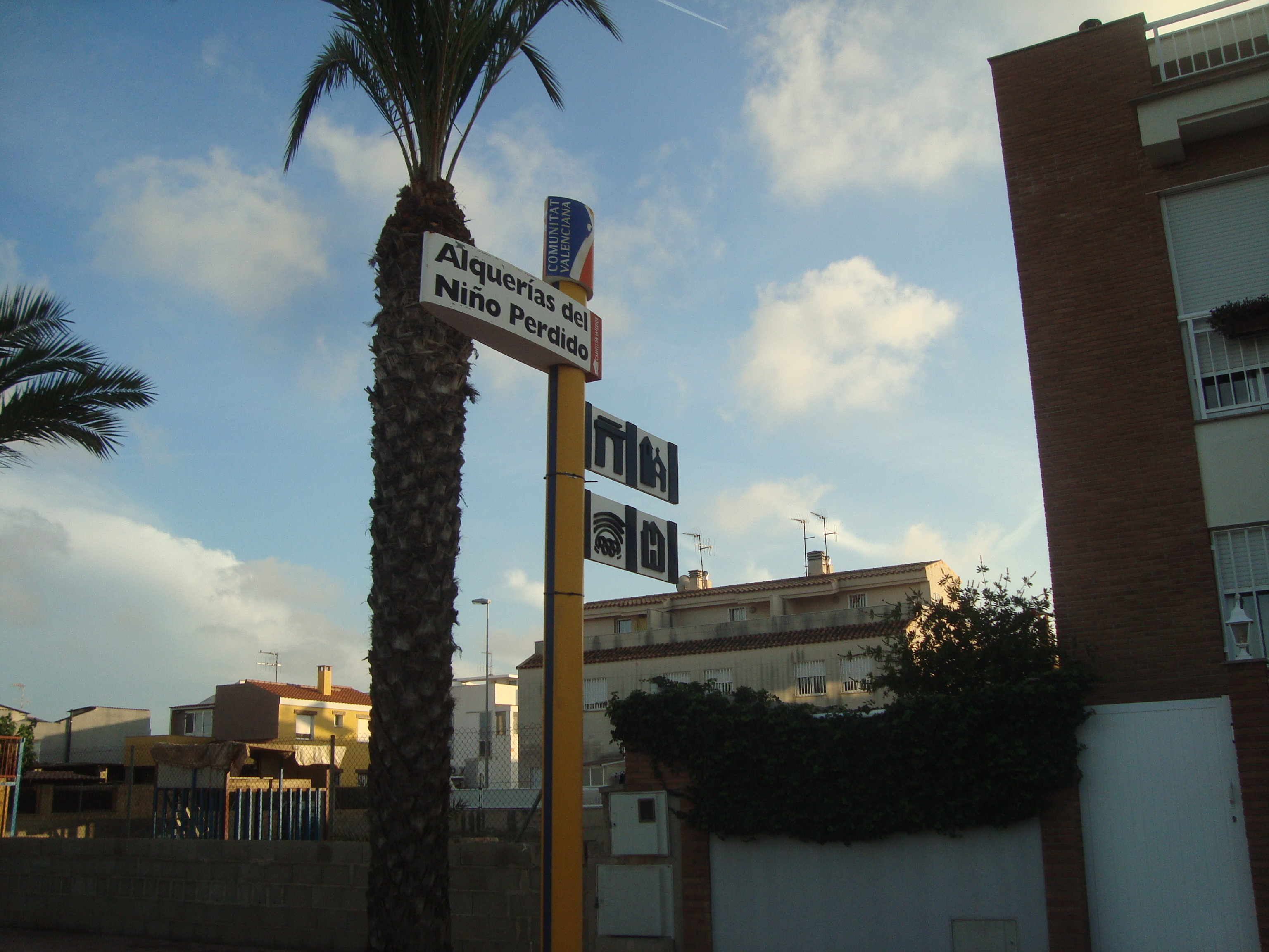 Alquerías del Niño Perdido, Castellón (Comunidad Valenciana)